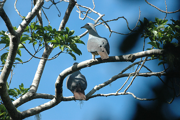 Peale's Imperial Pigeon (Ducula latrans)